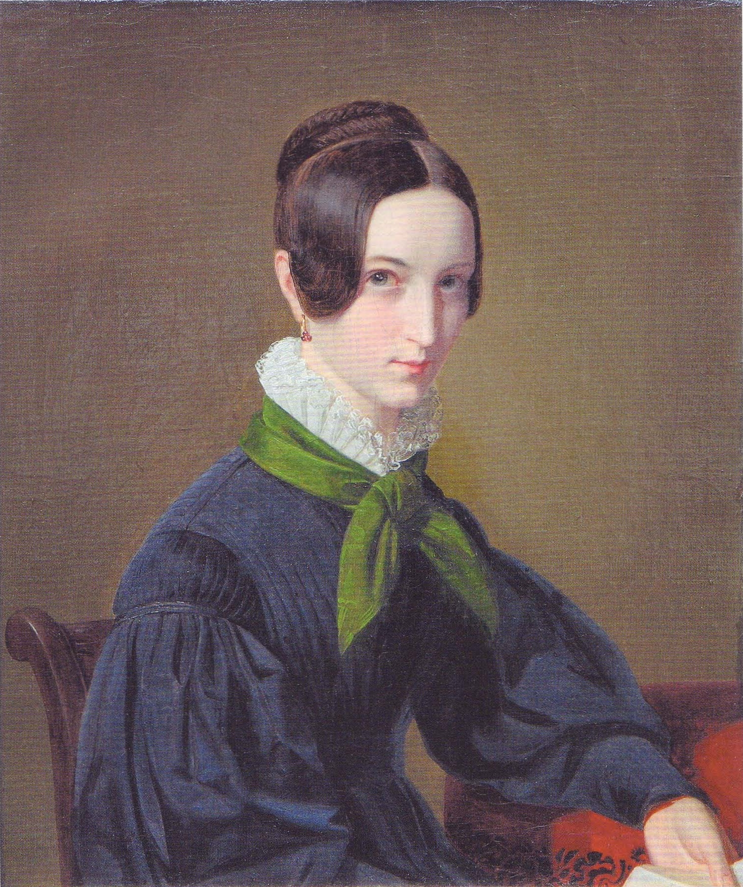 Therese Staufenau geb. Gauß im Alter von etwa 18 Jahren, Ölgemälde auf Leinwand von Ludwig Becker (1808–1861), 36,5 x 30,5 cm, 1834.